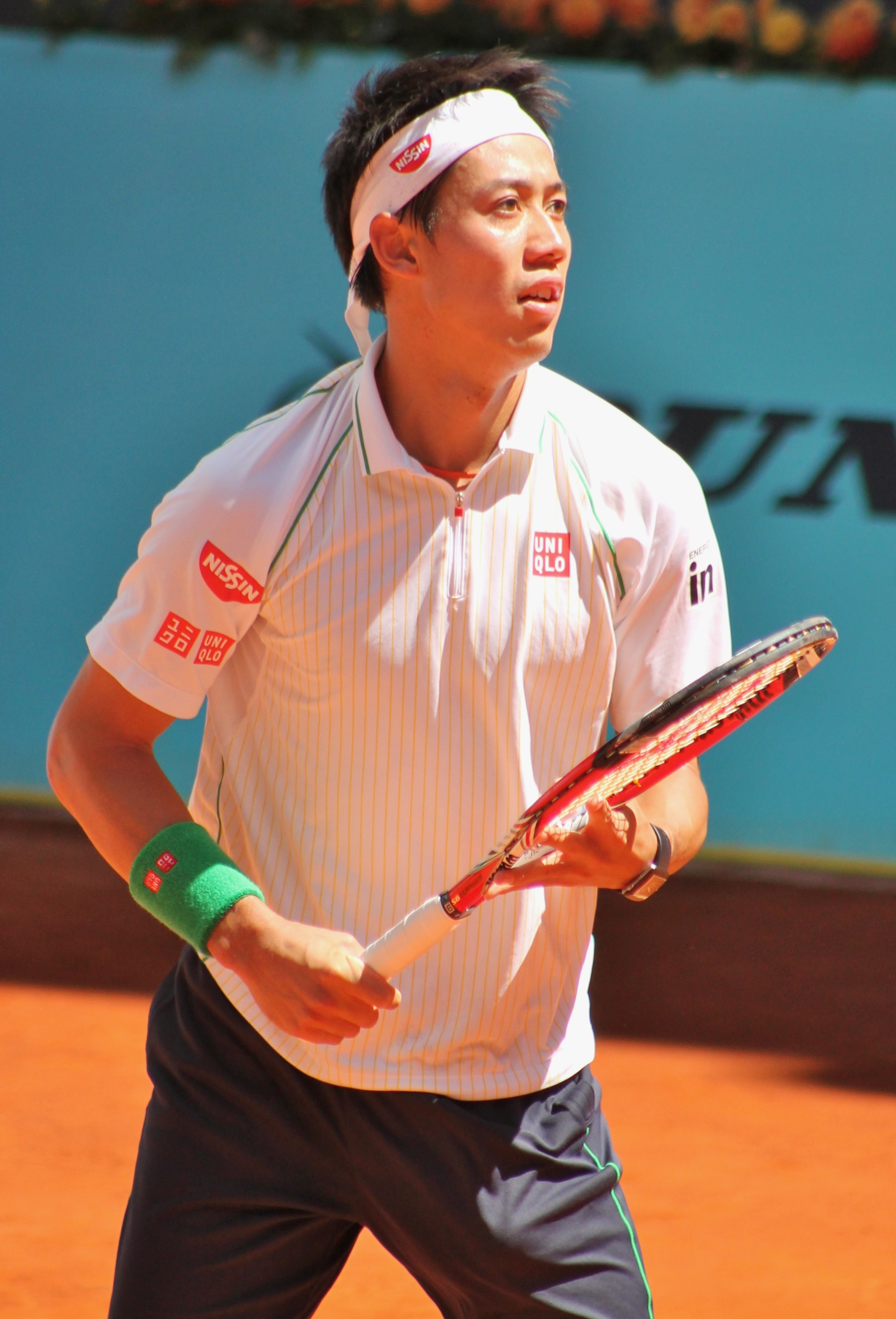 Nishikori MA14 (11)